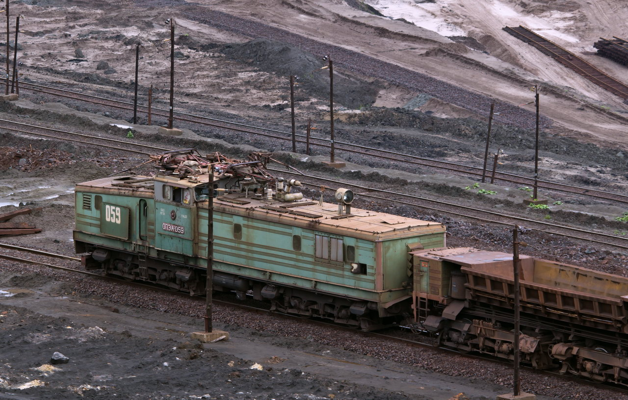 Тяговый агрегат ОПЭ1А-059 в карьере Михайловского горно-обогатительного комбината